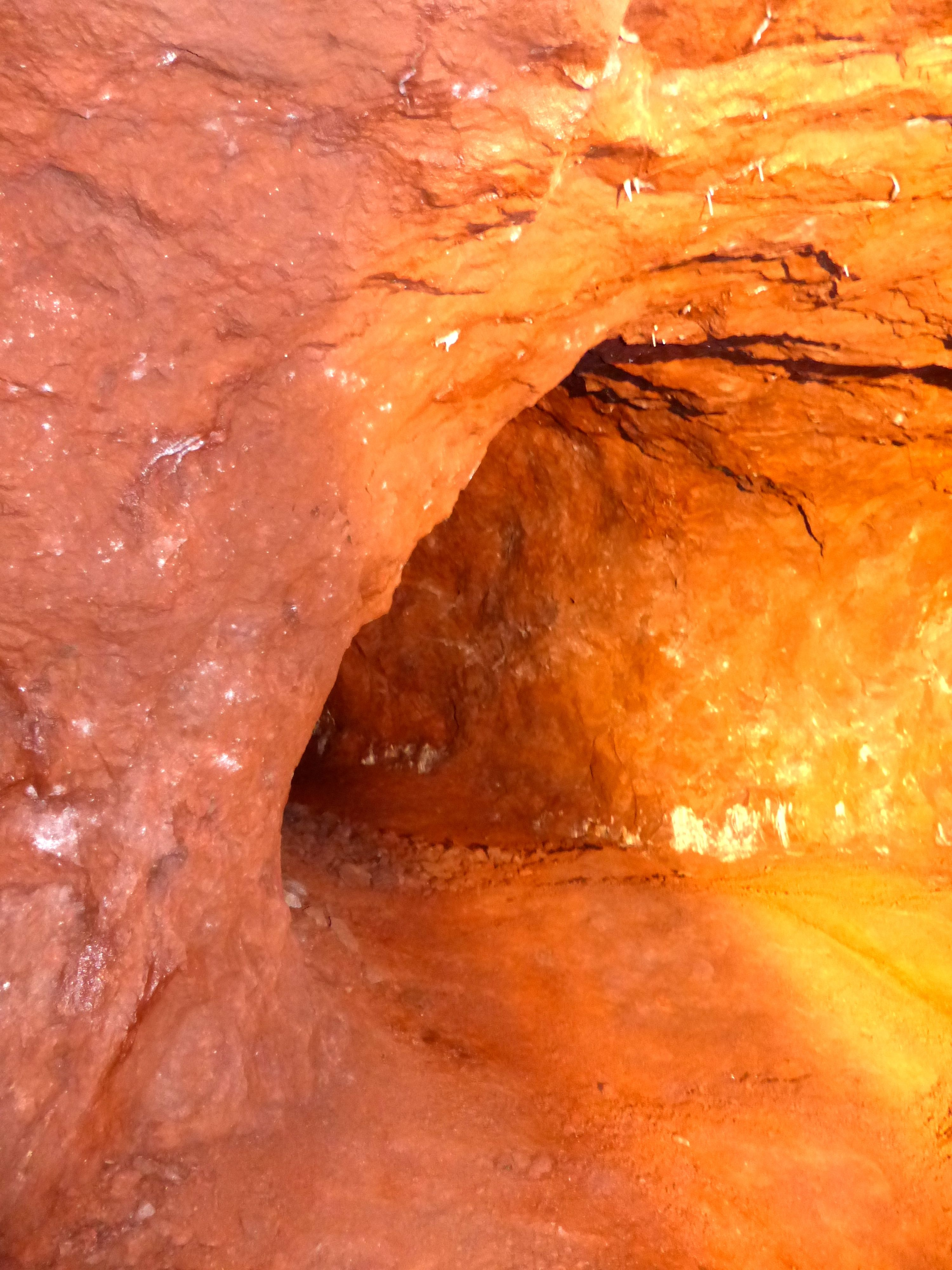 Sicherheitspfeiler (links) des Pfeilerkammerbaus im Eisenerzbergbau (Philippsstollen) bei Olsberg